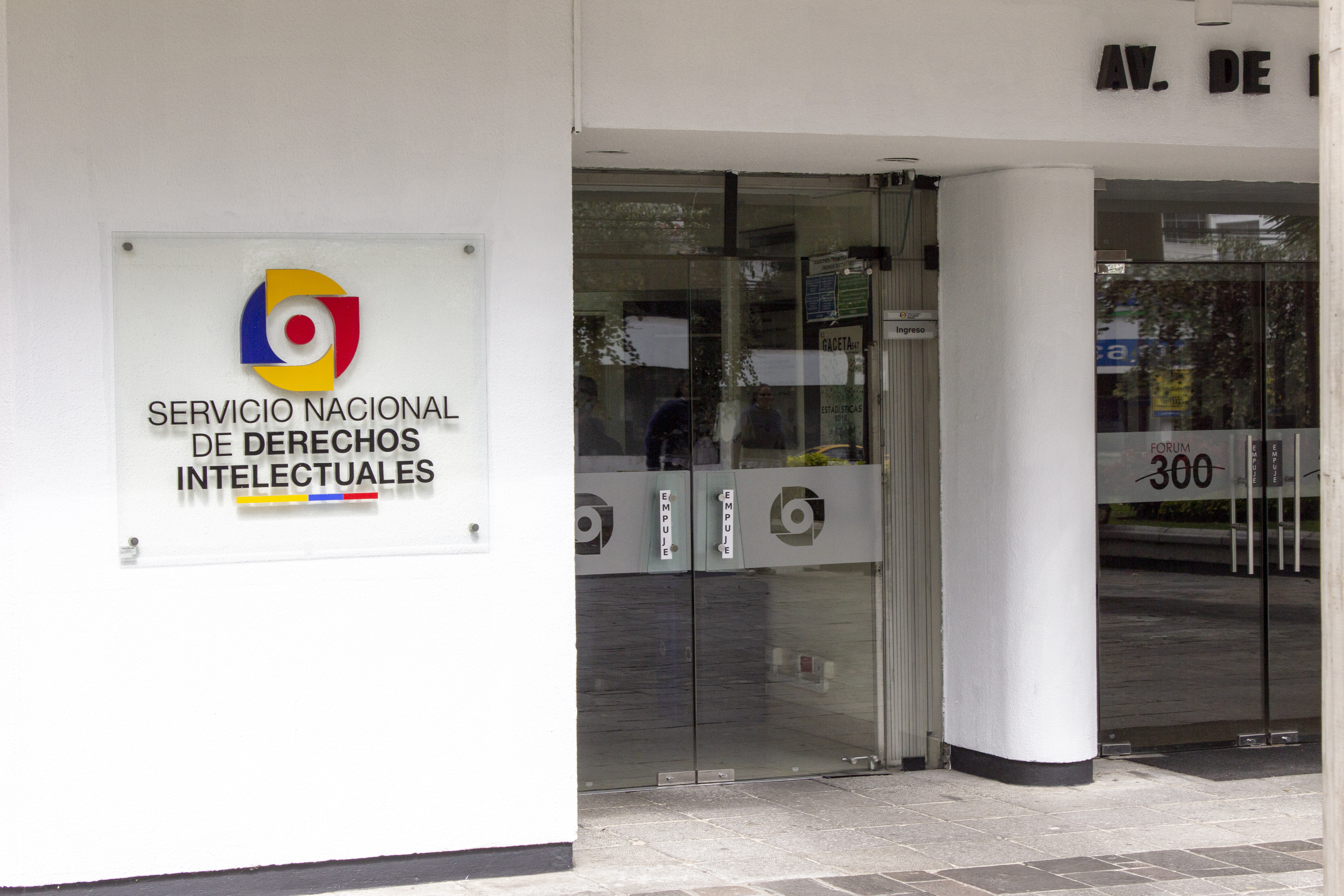 Matriz de la institución, Servicio Nacional de Derechos Intelectuales (SENADI)